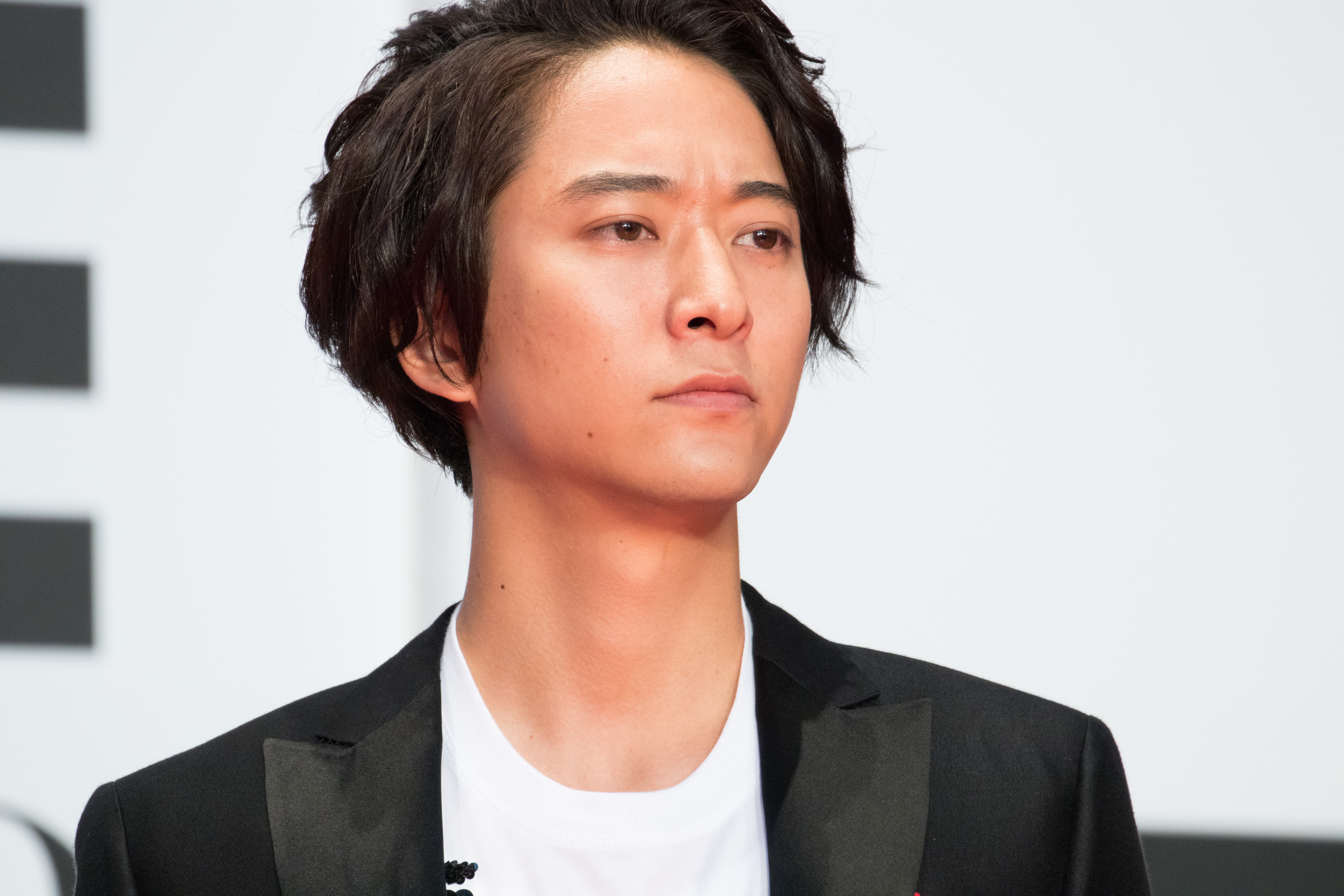 第29回 東京国際映画祭 オープニングセレモニー 浅香航大 (太陽を掴め)